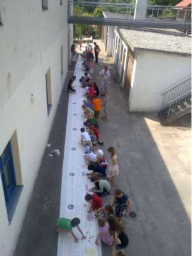 Die Friedens-Banderole bei einer Malaktion in der Freien Waldorfschule in Wolfratshausen (2011)